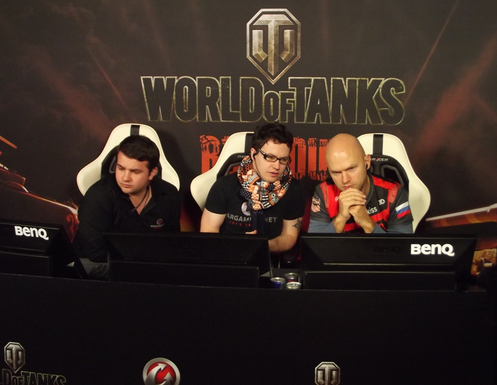 Zdjęcie zrobione podczas Intel Extreme Masters 2013 w katowickim Spodku.